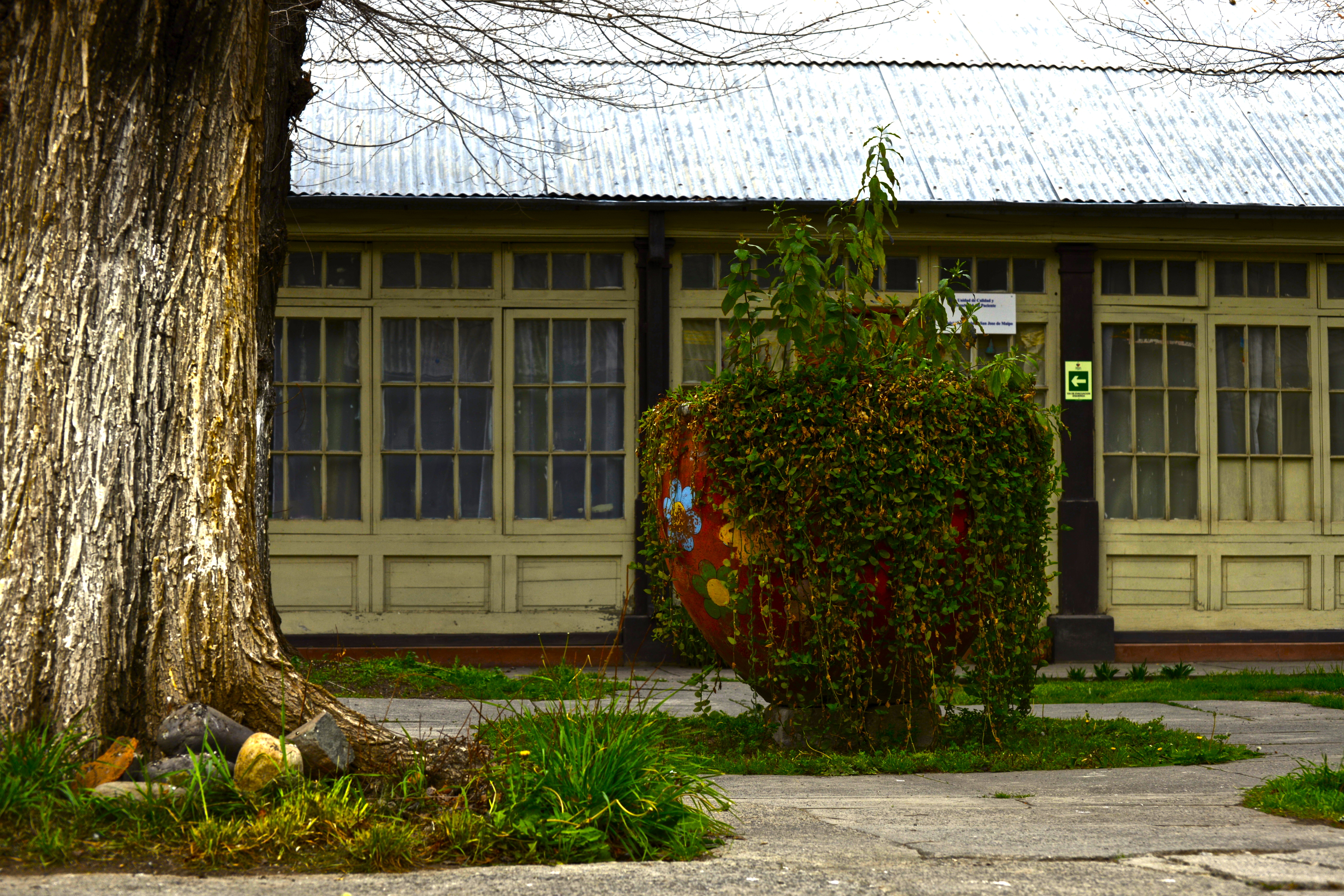 Edificio del ex Sanatorio Laennec This is a photo of a national monument in Chile: 660